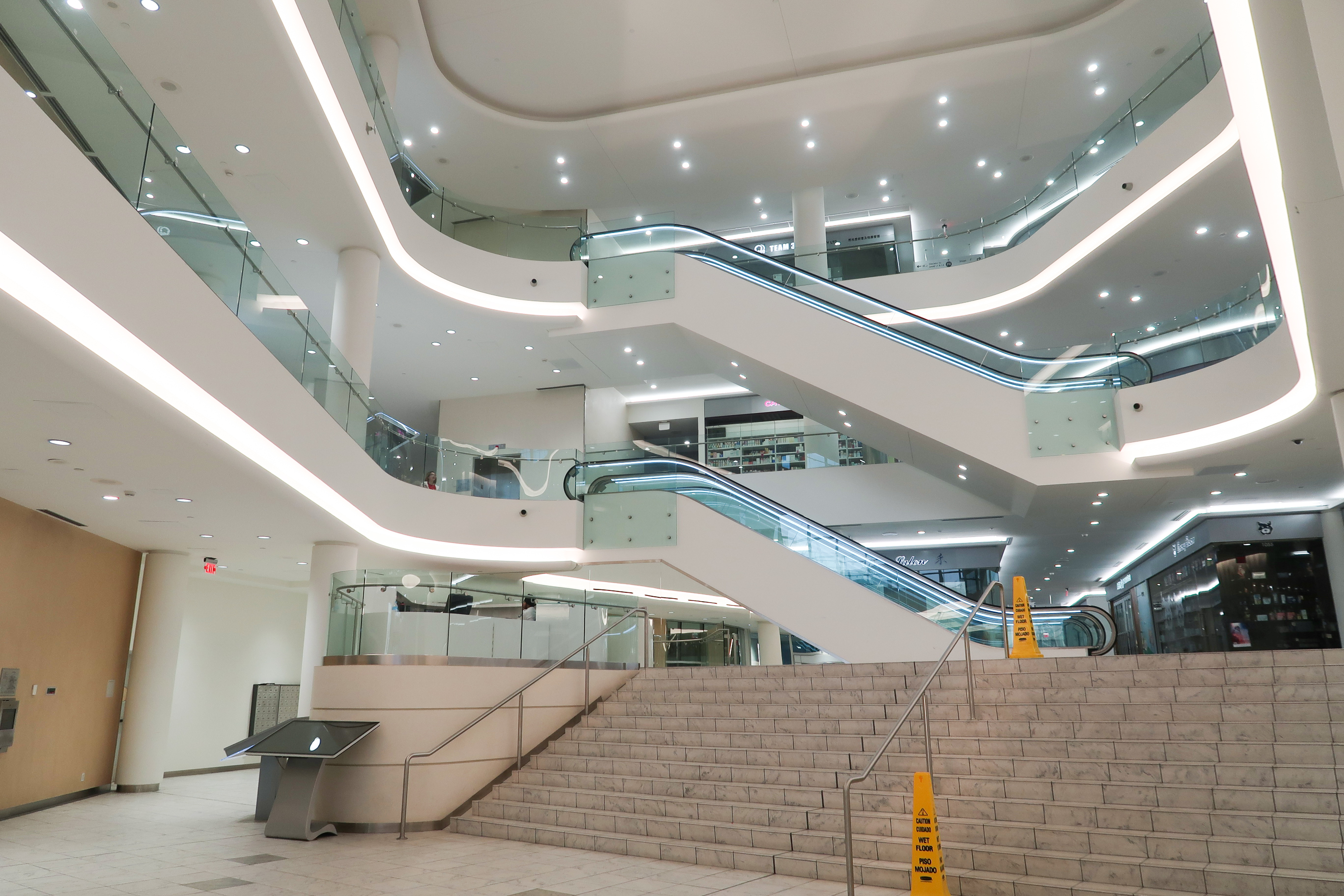 Aberdeen Square Atrium